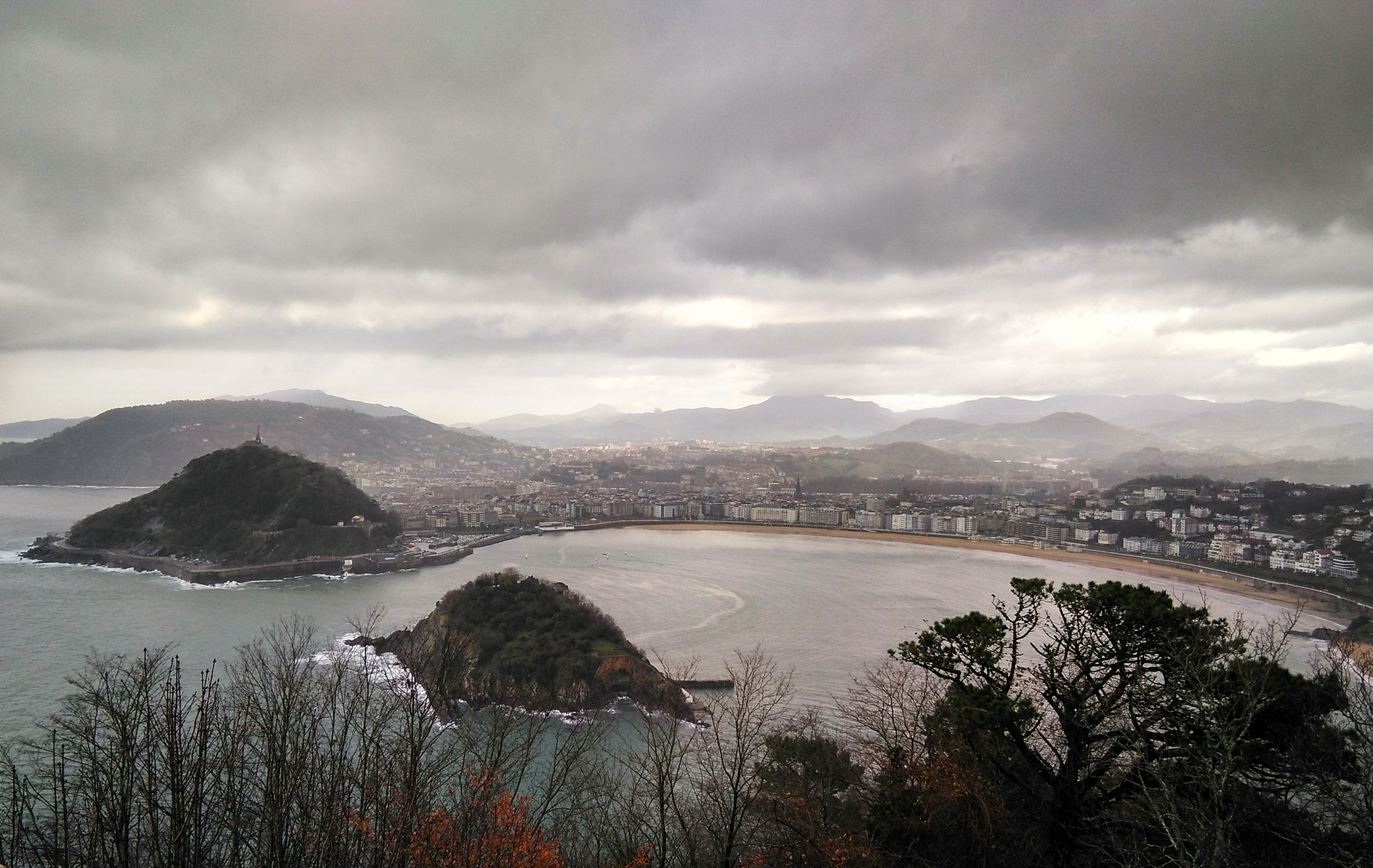 Vista de la playa de la Concha de San Sebastián desde el monte Igueldo, en diciembre de 2017. A la izquierda de la fotografía, se ve el monte Urgull y la isla de Santa Clara.